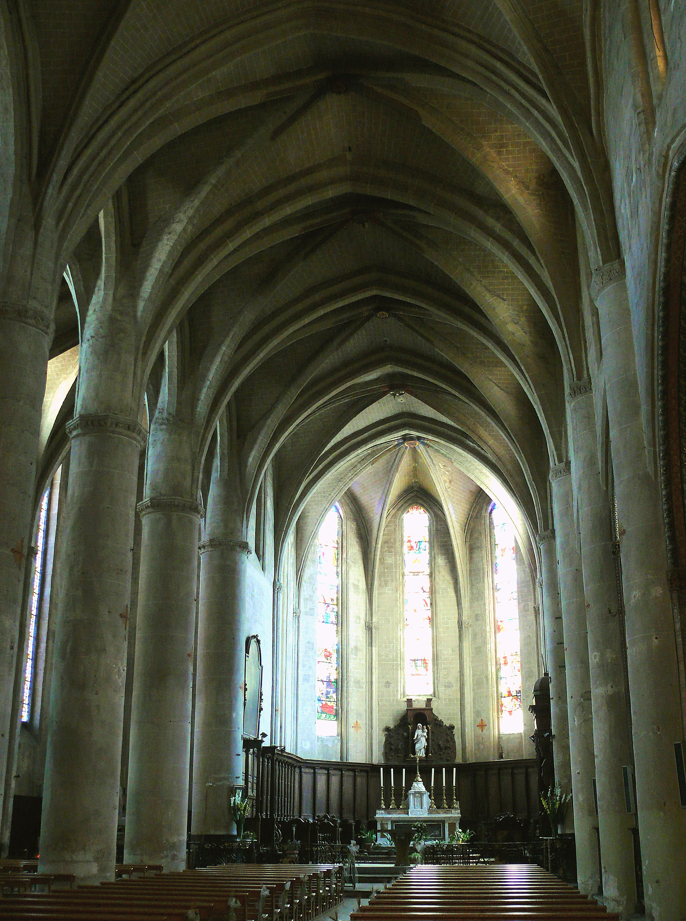 Cathédrale Sainte Marie de Lombez - Grande nef